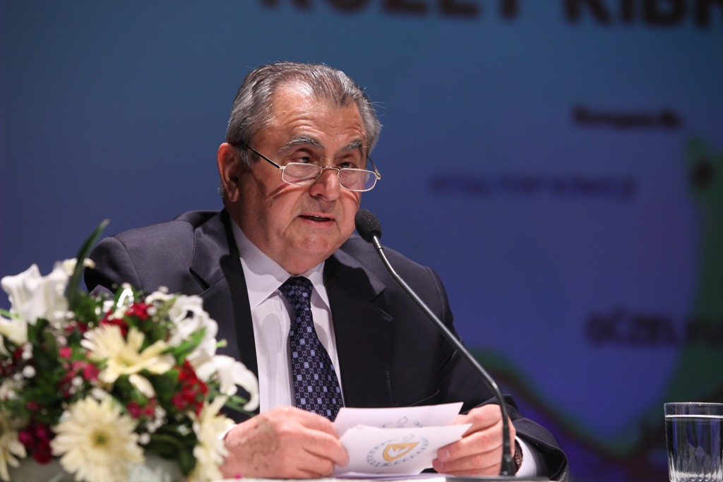 İrsen Küçük